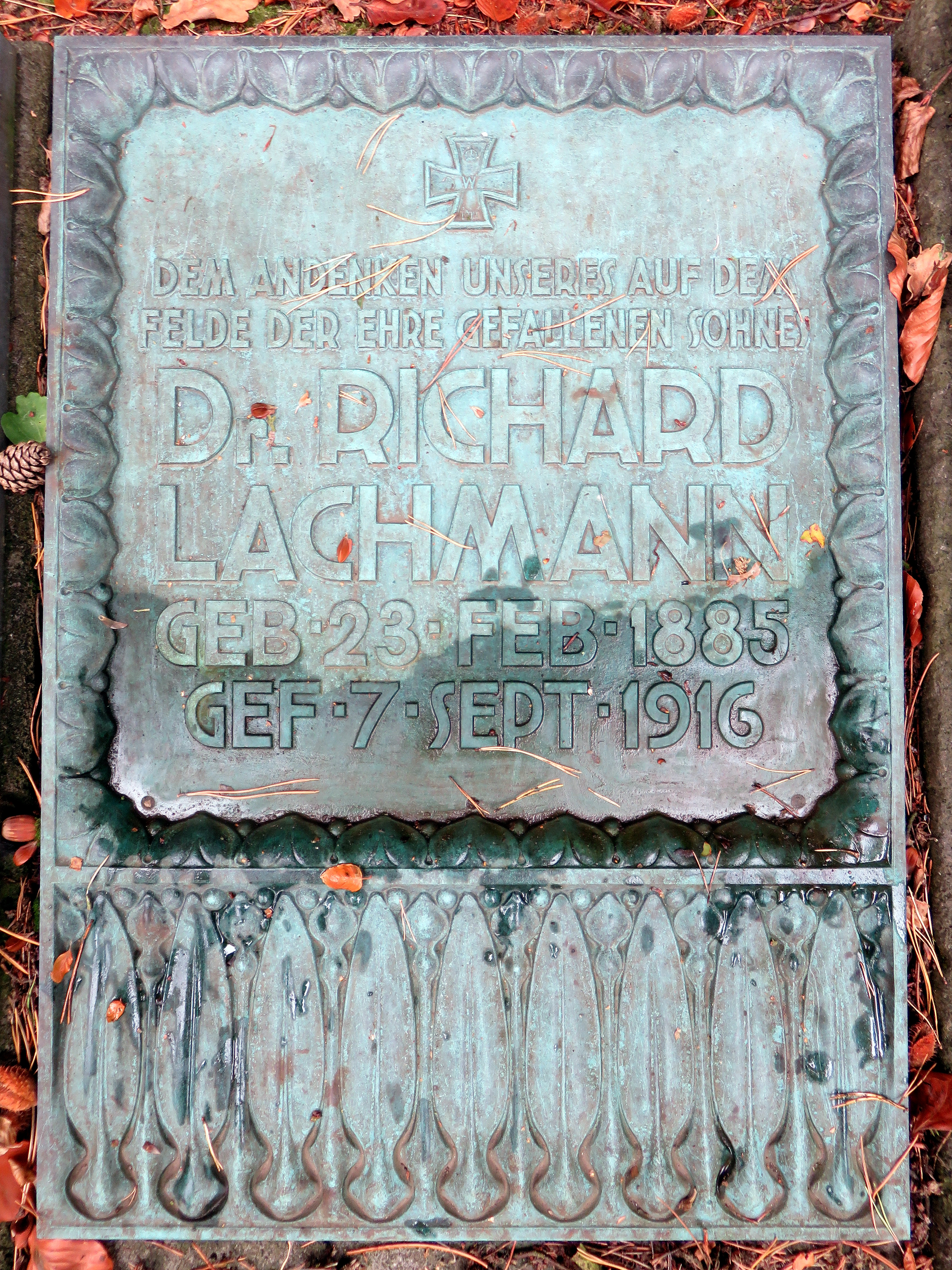 Kissenstein des deutschen Geologen Richard Lachmann auf dem Familiengrab Lachmann, Friedhof Ohlsdorf, Planquadrat Z 22 (nordöstlich Kapelle 2). Die Bronzeskulptur wurde 1907 vom dänisch-norwegischen Bildhauer Stephan Sinding geschaffen.